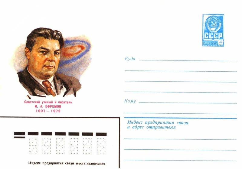 Художественные маркированные конверты 1982 года.